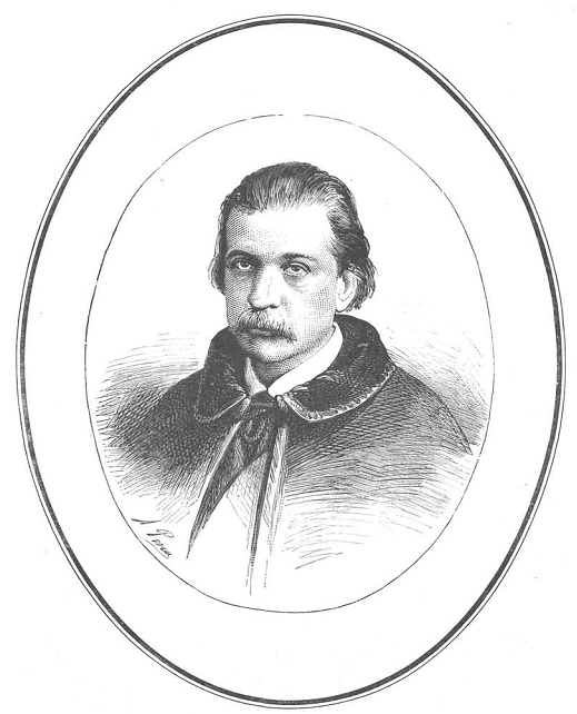 El baile de «Blanco y Negro», en el Teatro Real, la noche del 30, dibujo del natural de Narciso Méndez Bringa, en la revista La Ilustración Española y Americana.